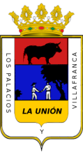 Escudo Oficial de Los Palacios y Villafranca (Sevilla)